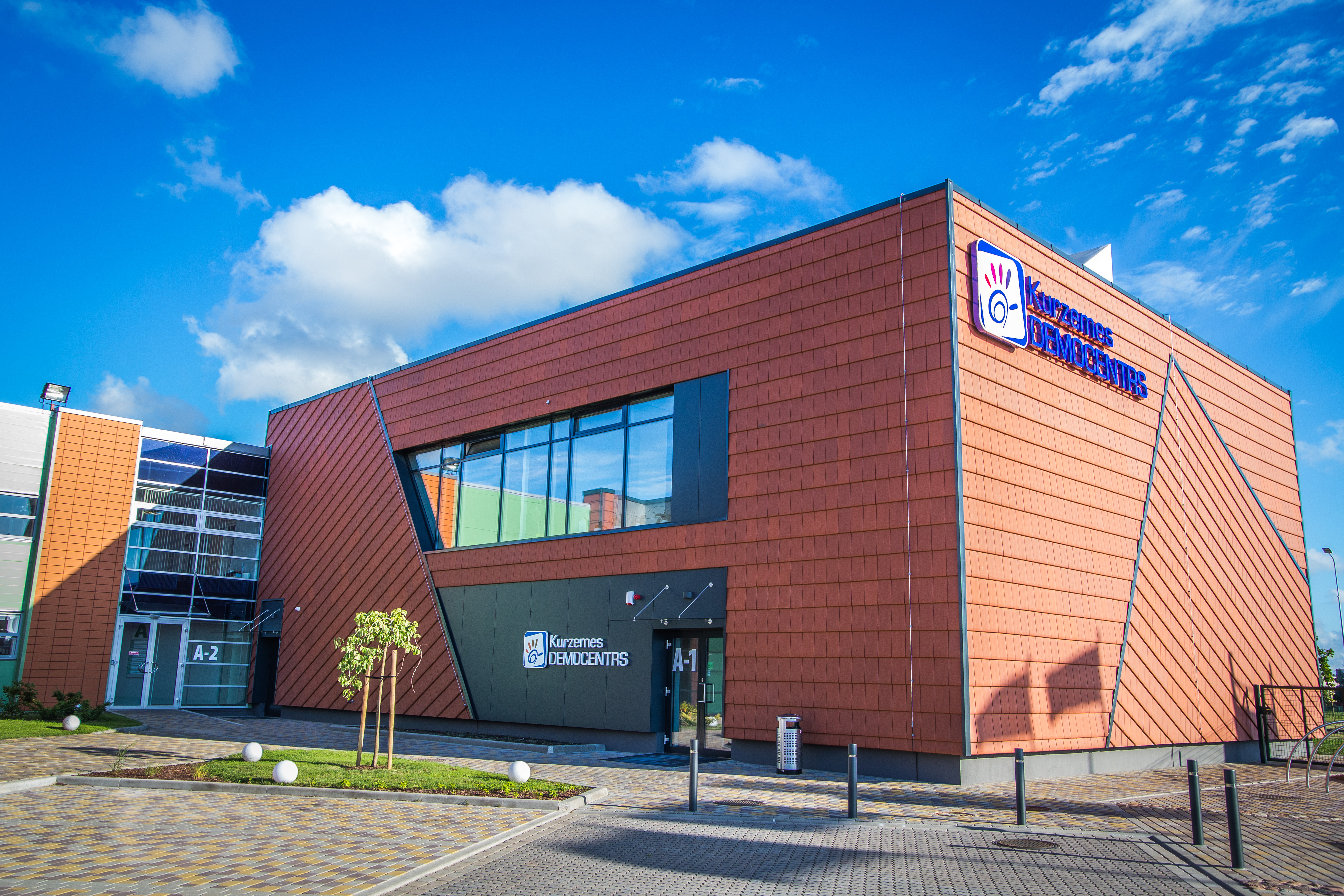 Kurzemes democentra ēka